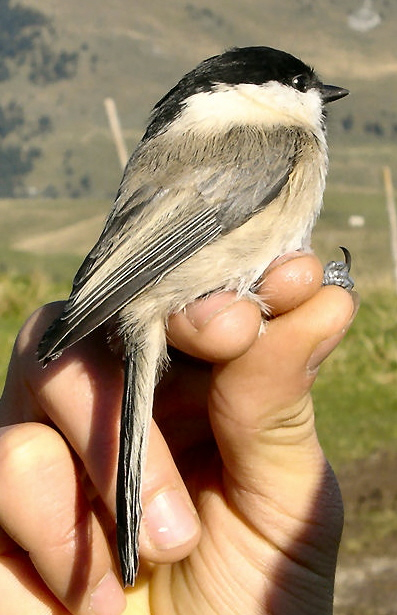 Parus montanus